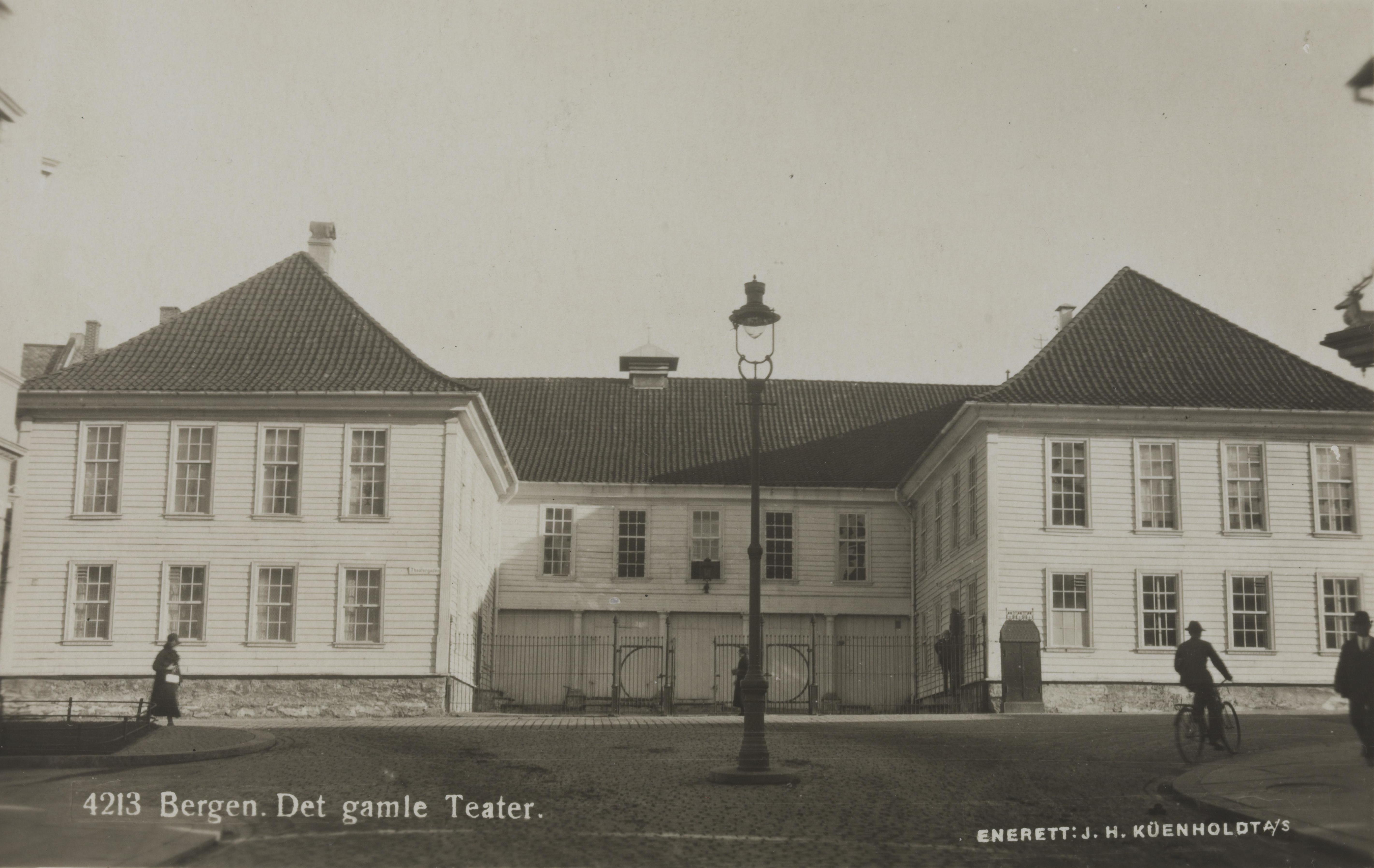 Bildet er hentet fra Nasjonalbibliotekets bildesamling Bergen, Hordaland